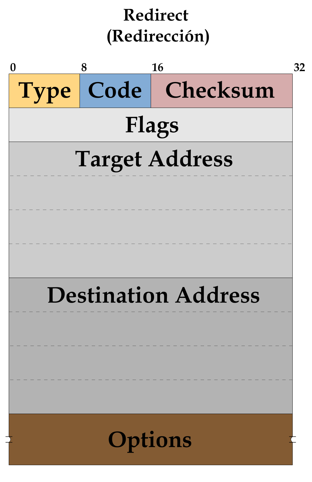 Formato de mensaje ICMPv6 Redirect